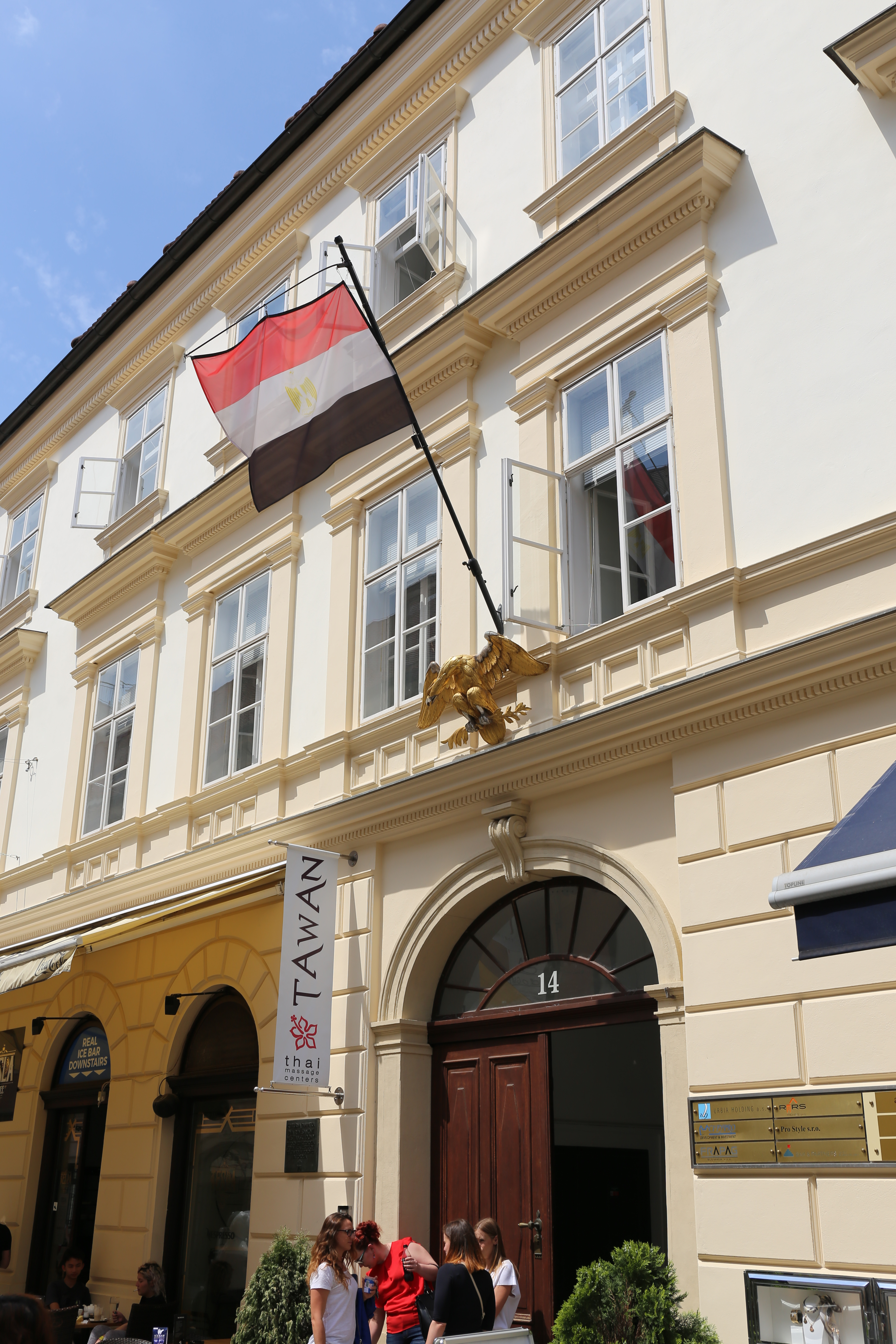 Ambassade d'Égypte à Bratislava.